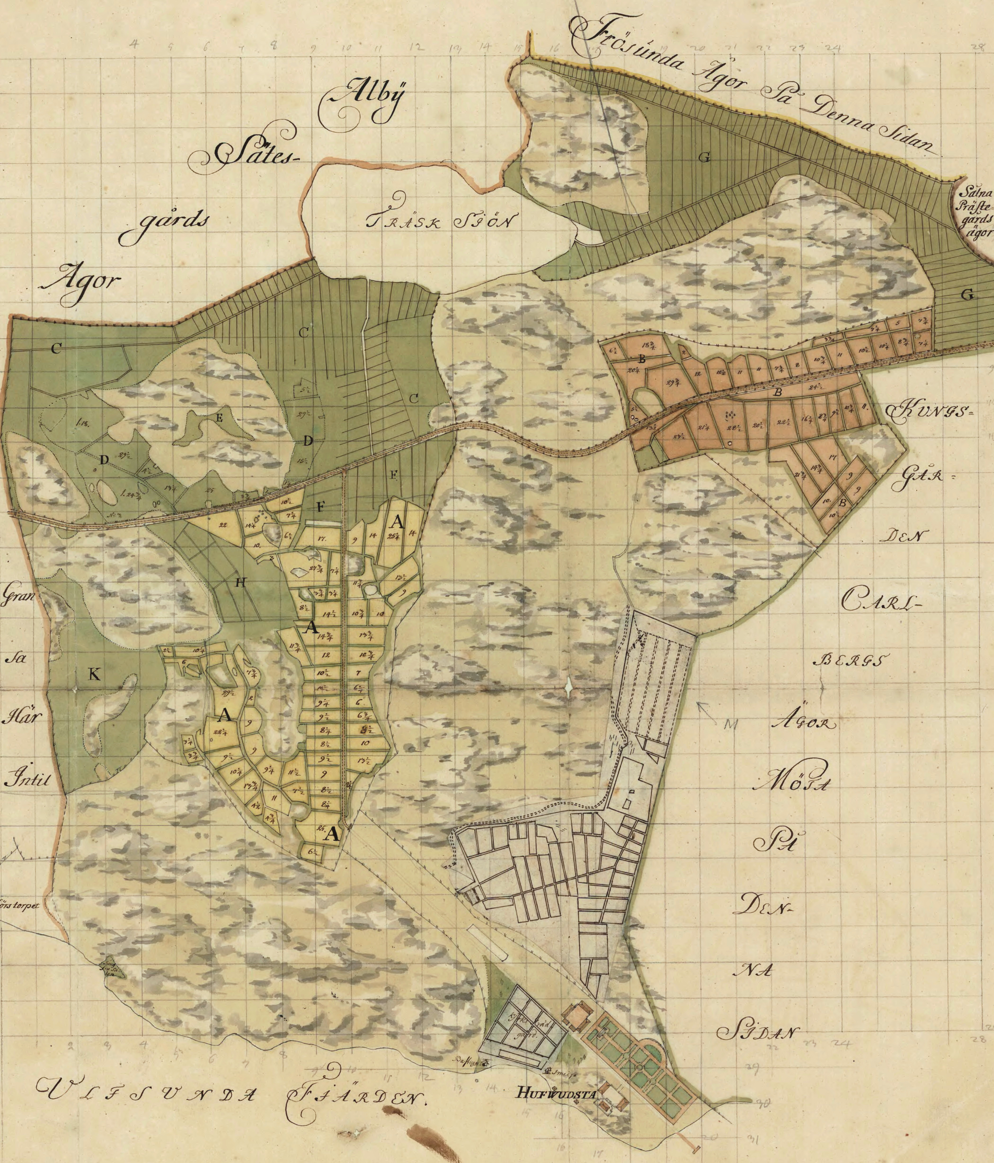 Karta över Hufwudstas ägor